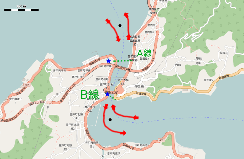 広島県呉市の音戸瀬戸航路 This map may be incomplete, and may contain errors. Don't rely solely on it for navigation.